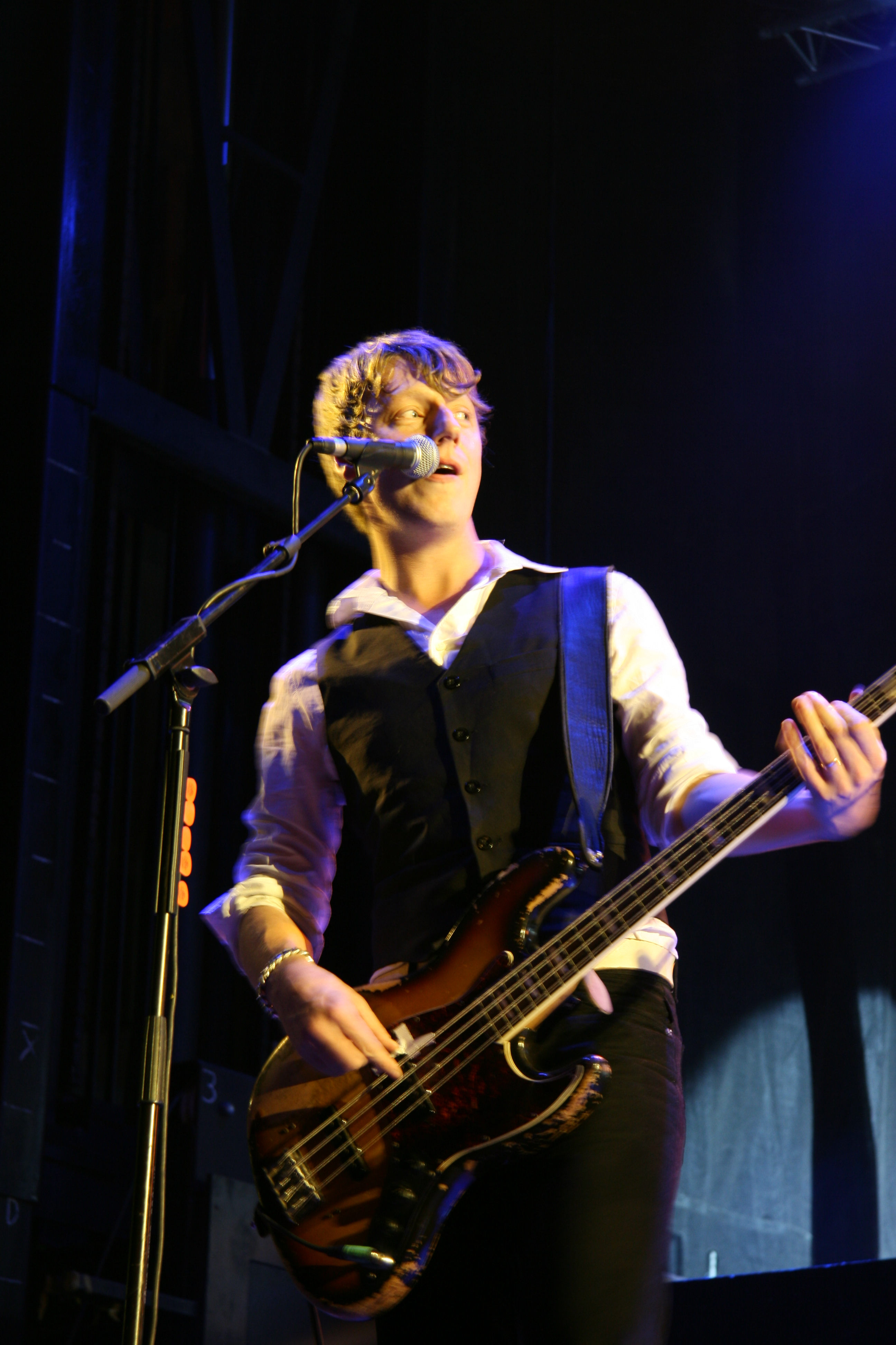 Travis en la antigua Fábrica Damm de Barcelona